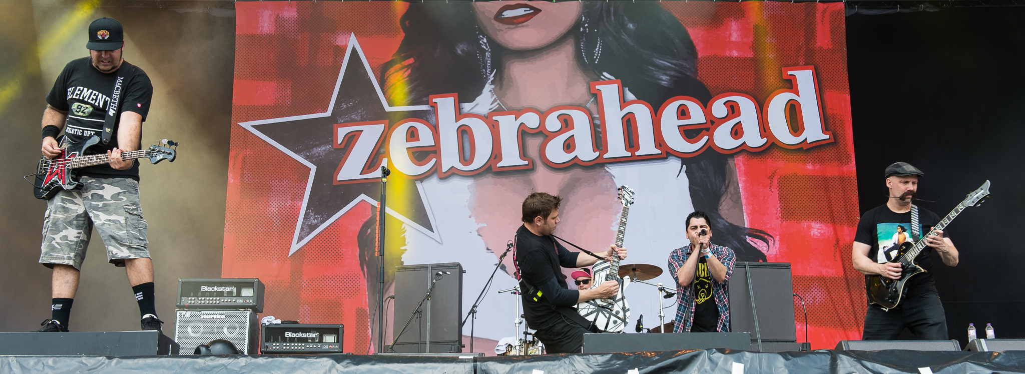 ARGO-Konzerte,Ali Tabatabaee,Ben Osmundson,Dan Palmer,Ed Udhus,Festival,Konzert,Livekonzert,Livemusik,Matty Lewis,Musik,RiP,Rock im Park 2015,Seat Zeppelin Stage,Zebrahead